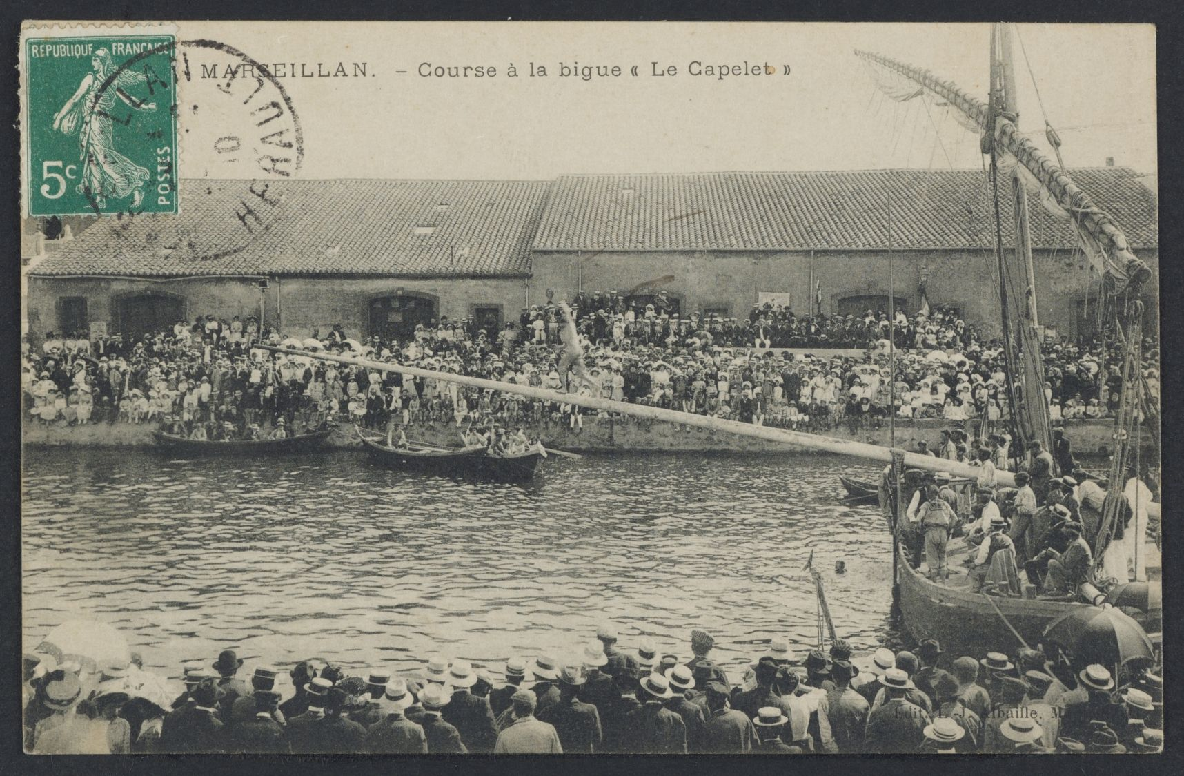 Marseillan. - Course à la bigue "le Capelet" : carte postale.